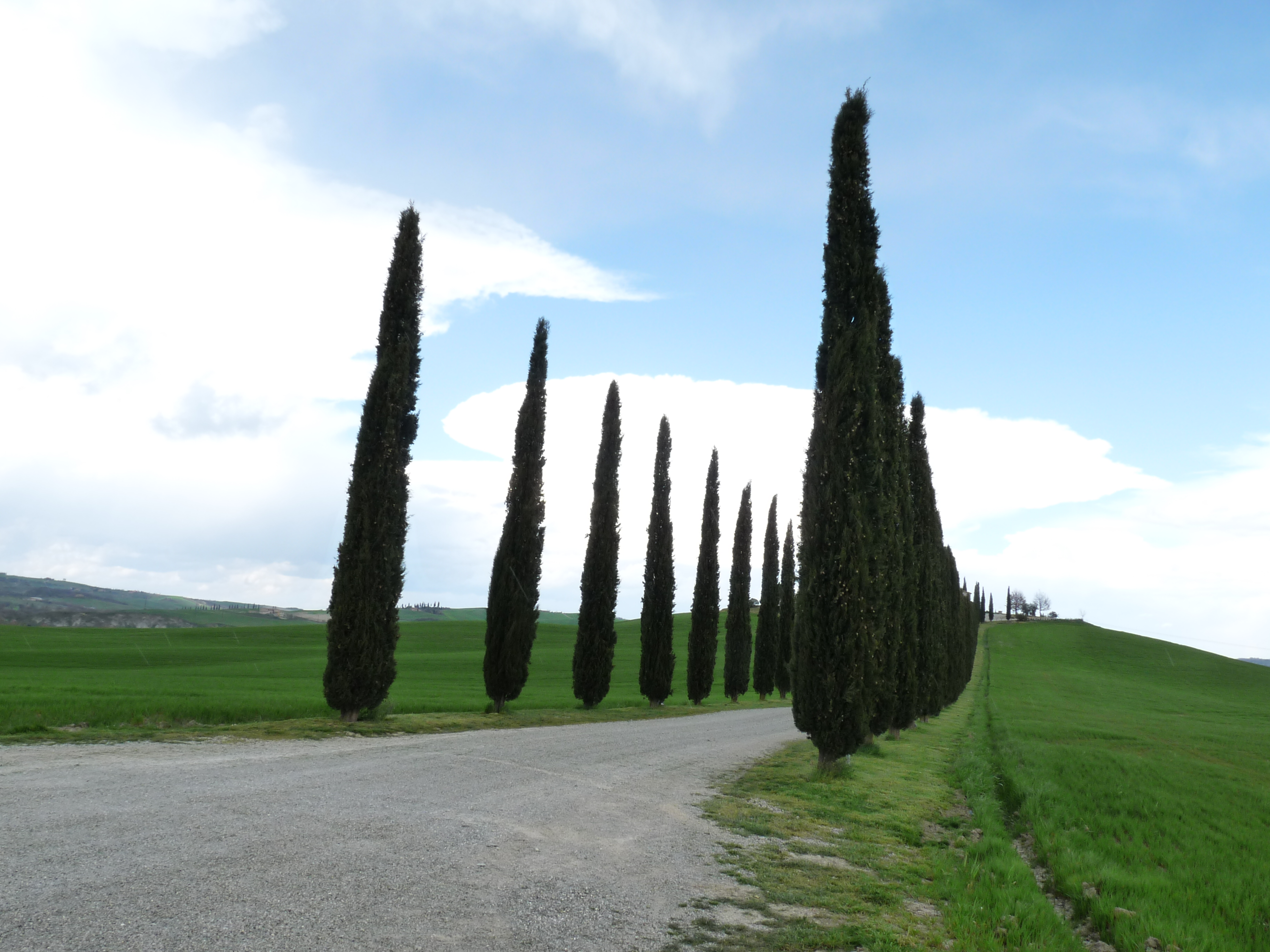 Toscana